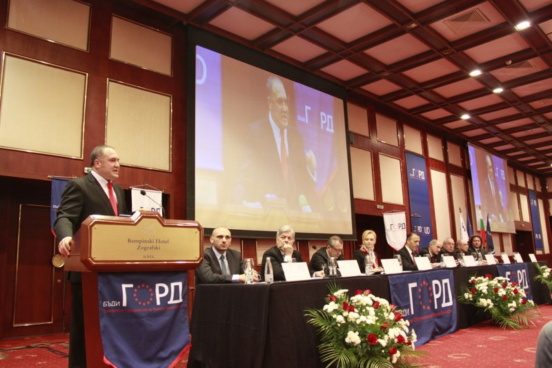 Слави Бинев представя новото гражданско сдружение - ГОРД на 22 април 2012 в София